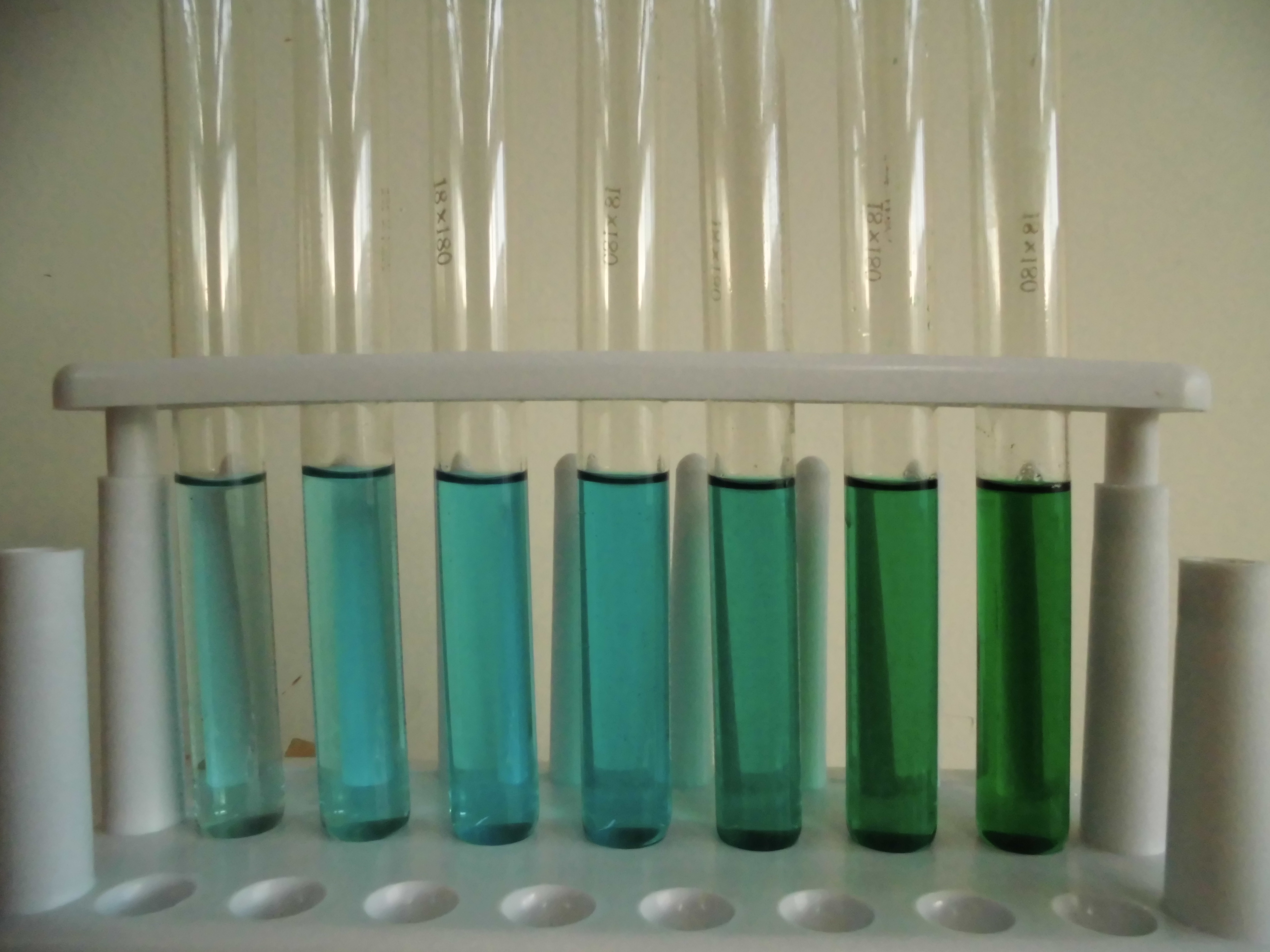 不同浓度的氯化铜(II)溶液，从左到右0.1、0.25、0.5、1.0、1.5、2.0、2.5（单位：mol/L）。